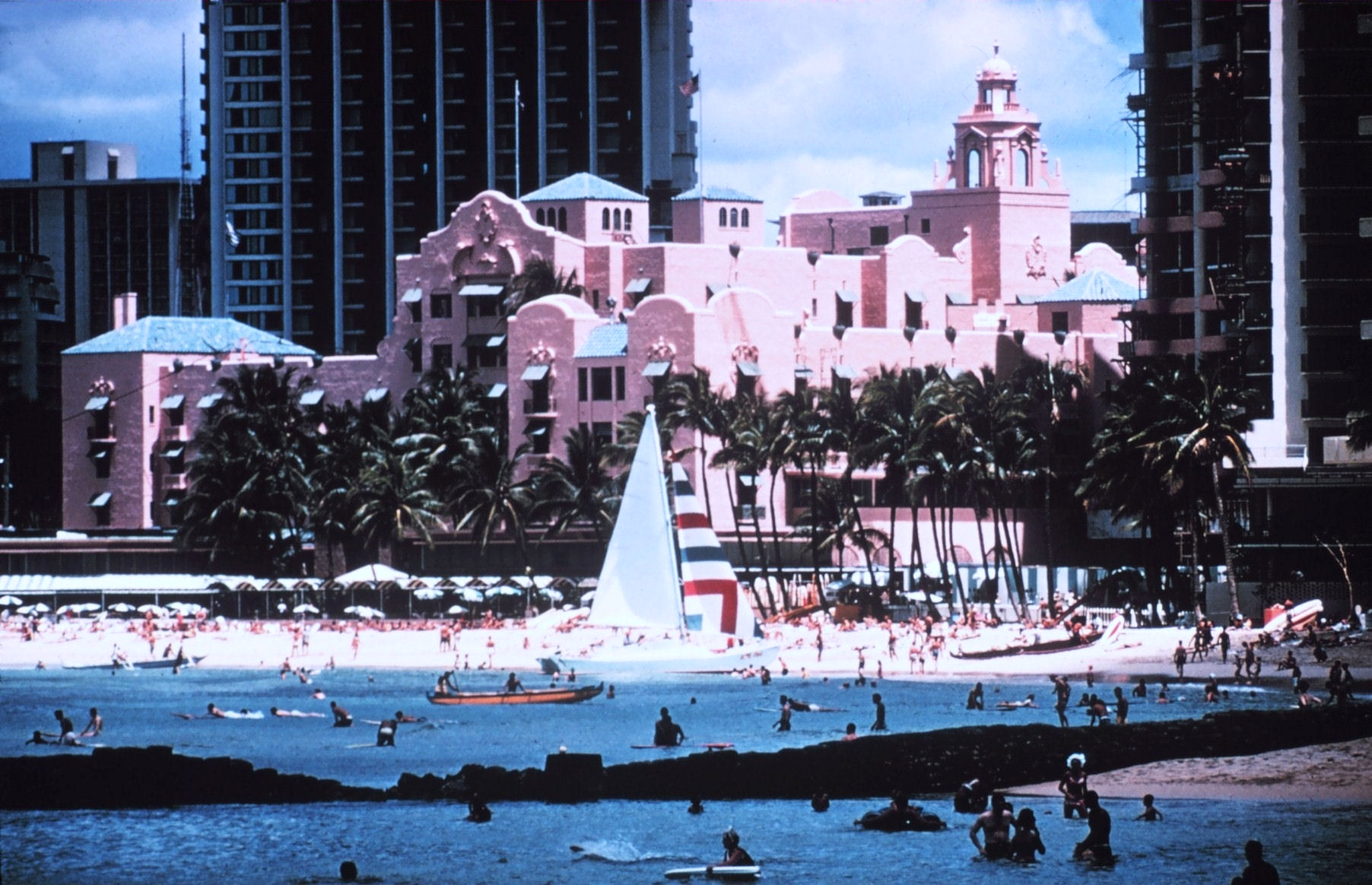 Waikiki Beach and Royal Hawaiian Hotel. 1969 December.